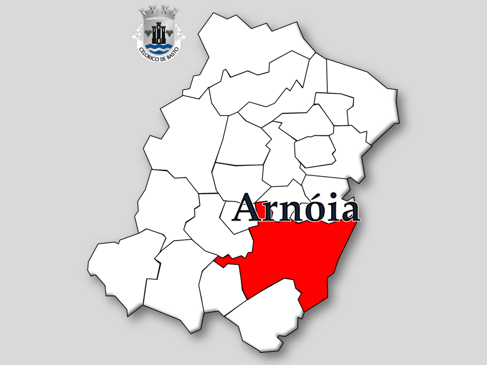 Censos 1864/2011